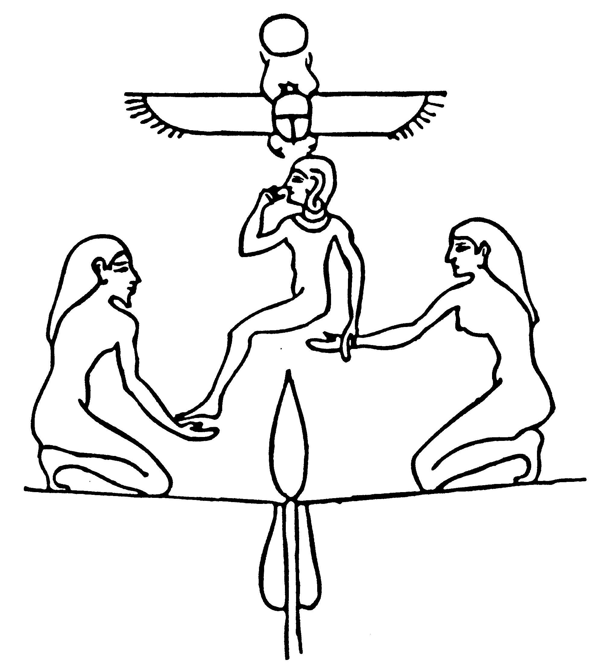 Ogdoada_and_sun.jpg